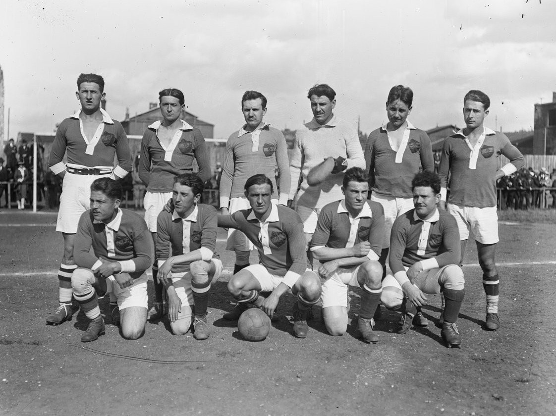 L'Olympique qui remporte 3 buts à 0 son match contre le Red Star le 19 septembre 1920 à Saint-Ouen (stade Bergeyre). Debout : Eugène Langenove, Audin, Potelune, Maurice Cottenet, Gustave Huysmans et Paul Baron. Accroupis : Jules Devaquez, Paul Landauer, Antoine Rouchès, Louis Darques et Eugène Dartoux.